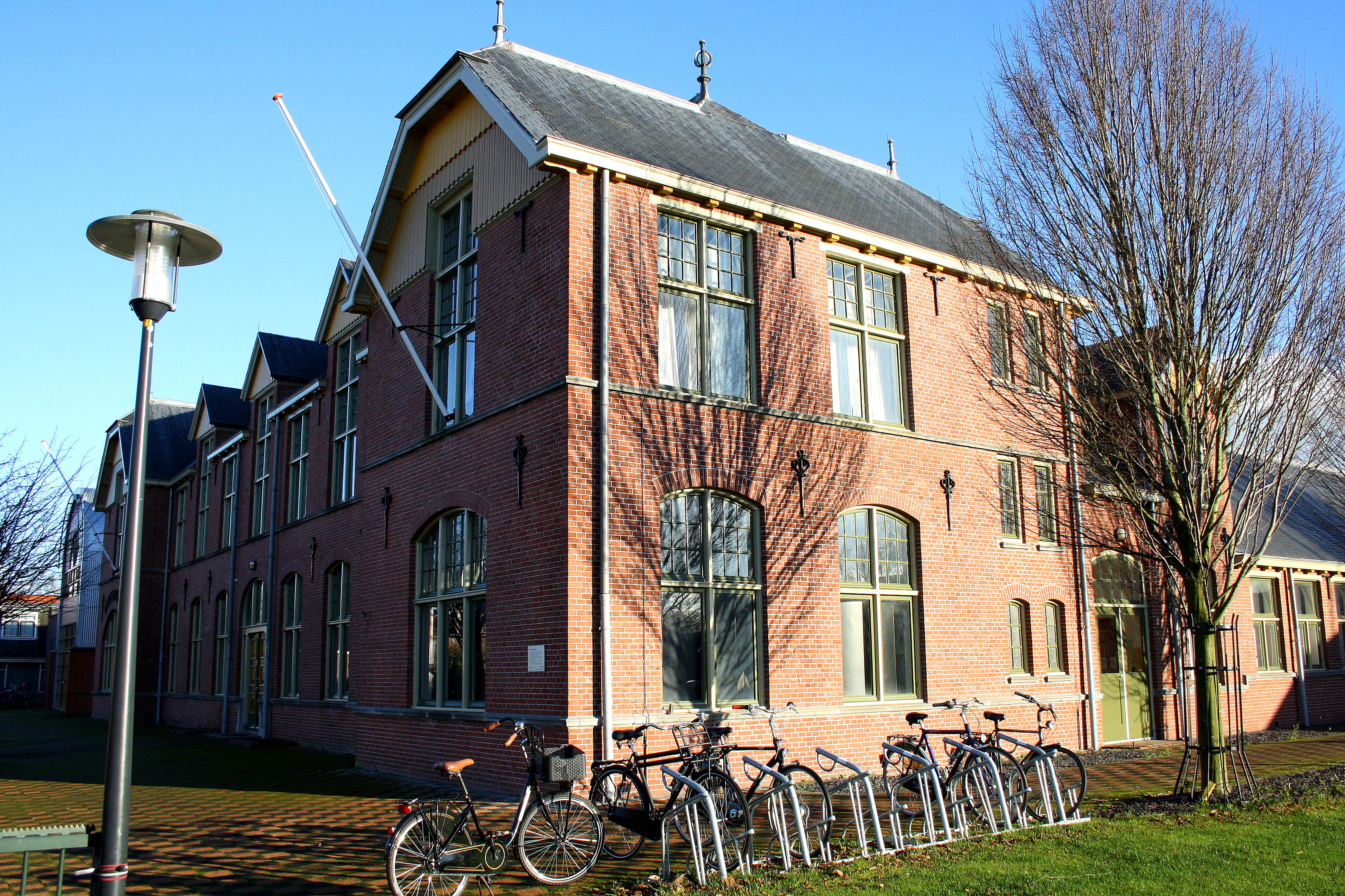 Noordwolde - Voormalige vlechtschool